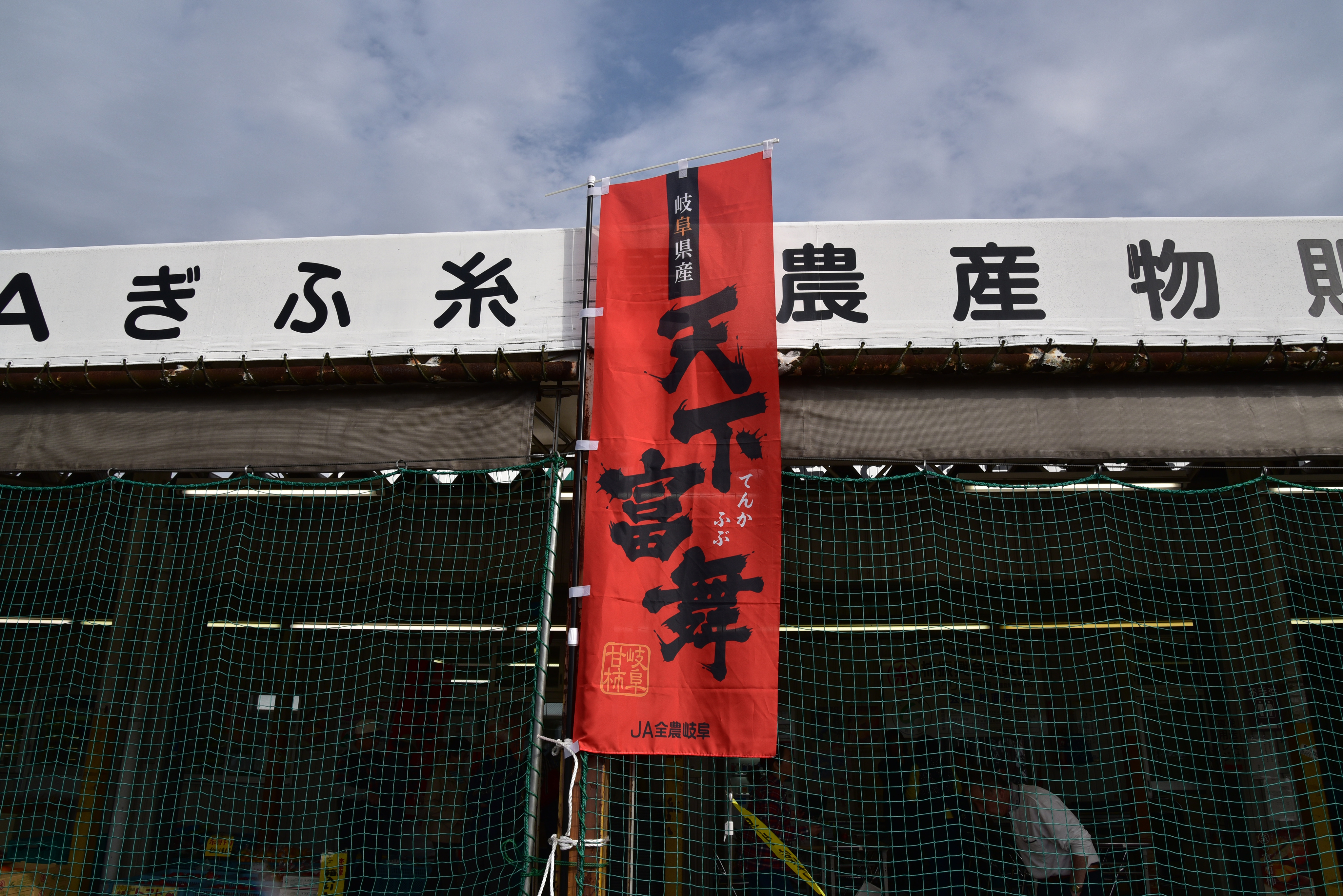 天下富舞を宣伝するためにJA全農岐阜が作成した旗